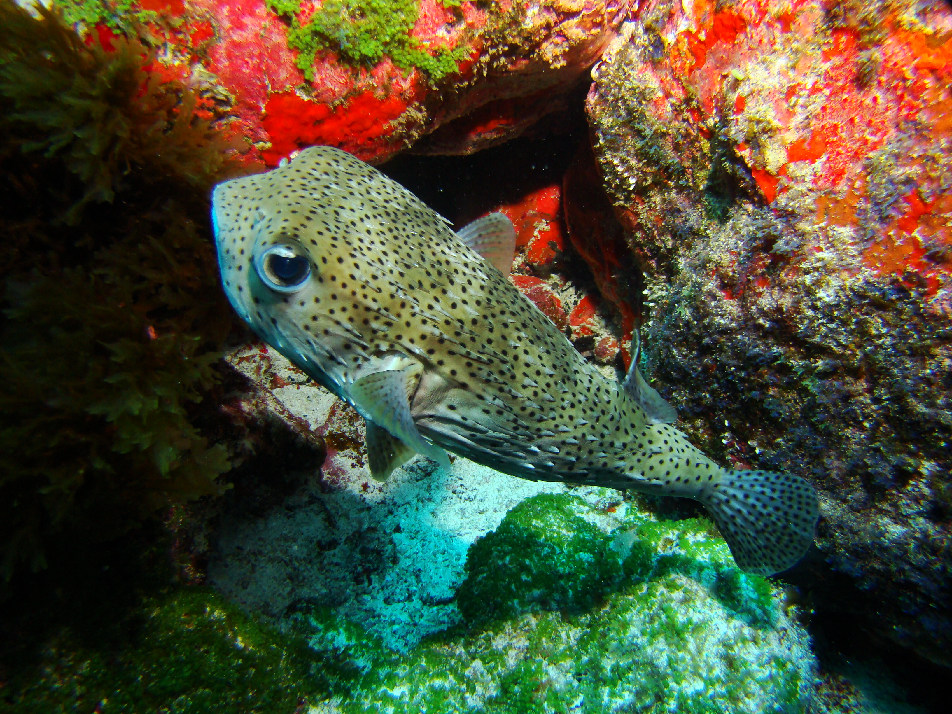 lindo baiacu , registrado durante mergulho em Fernando de Noronha